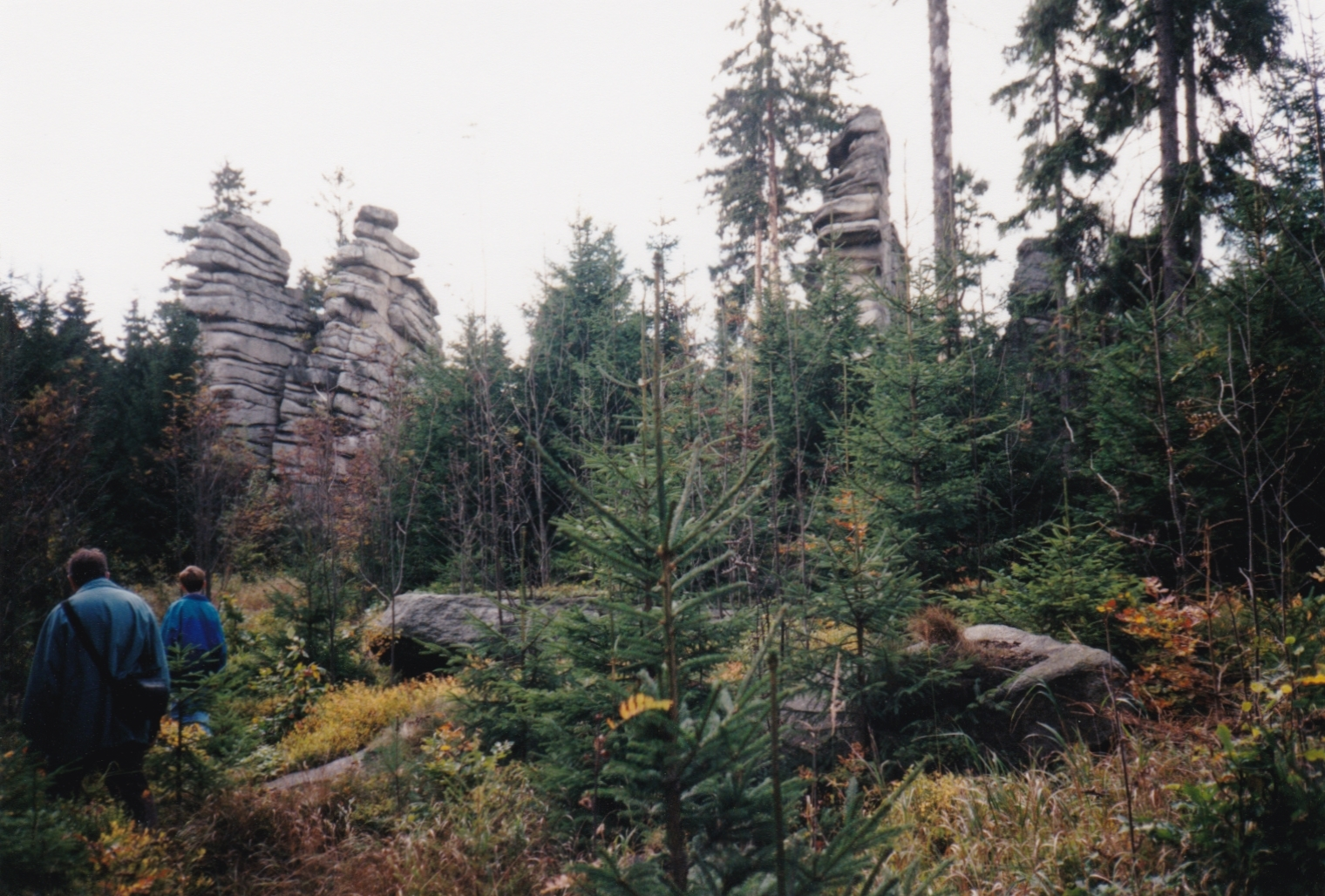 Geotop „Drei Brüder“, gemeindefreies Gebiet Meierhöfer Seite, Landkreis Wunsiedel im Fichtelgebirge